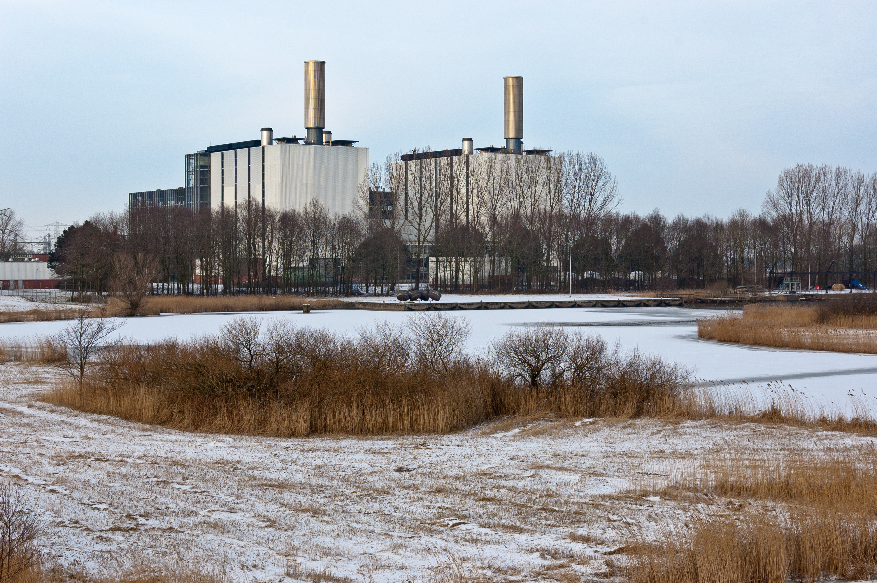 Electriciteits-centrale aan de Burgumermar